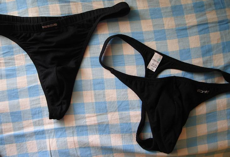 Meeste stringid "Atlantic"